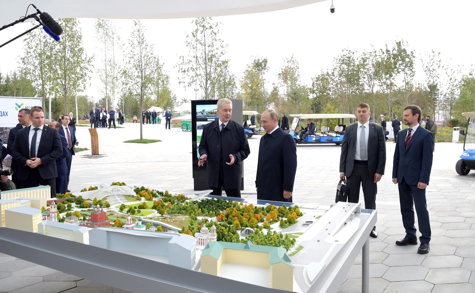 Во время посещения нового парка «Зарядье». С мэром Москвы Сергеем Собяниным.